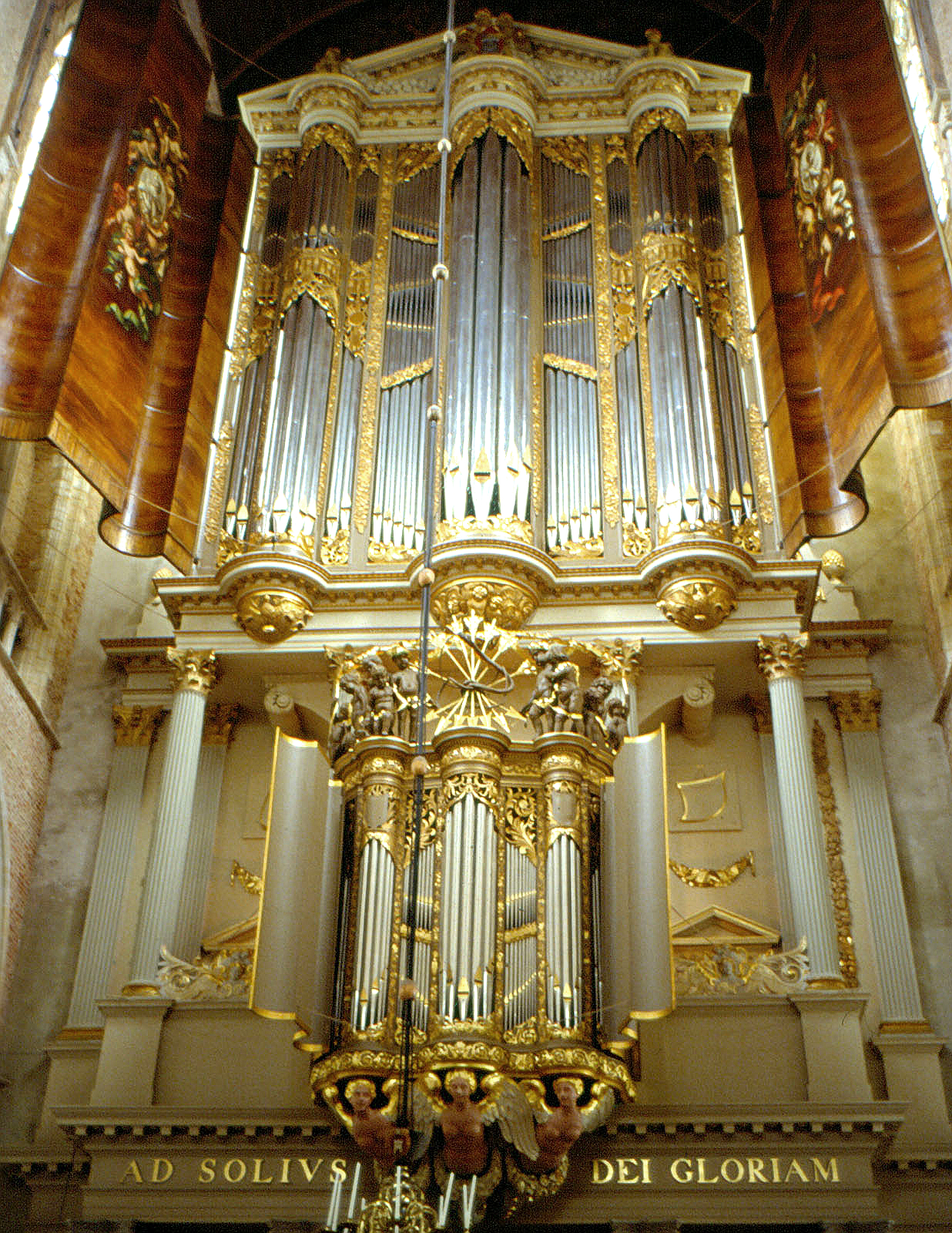 Organo Hegerbeer-Schnitger della St. Laurenskerk in Alkmaar, Olanda